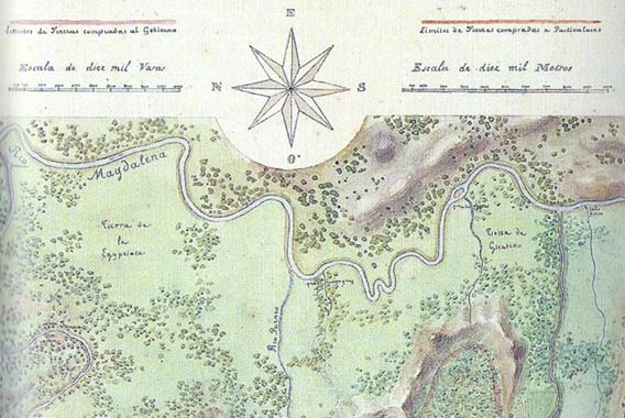 Mapa con escala comparativa en varas y metros, siglo XIX.Izqda.: Escala de diez mil Varas. Dcha.: Escala de diez mil Metros.